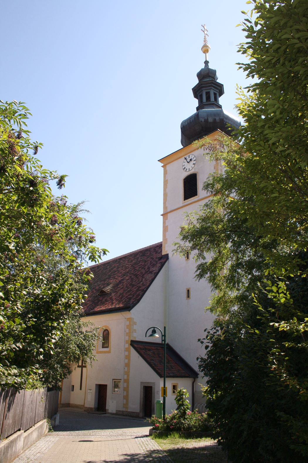 Die Pfarrkirche von Pfaffstätten, Niederösterreich